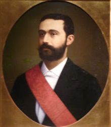 Retrato de Carlos Alfonso González de Orbegoso